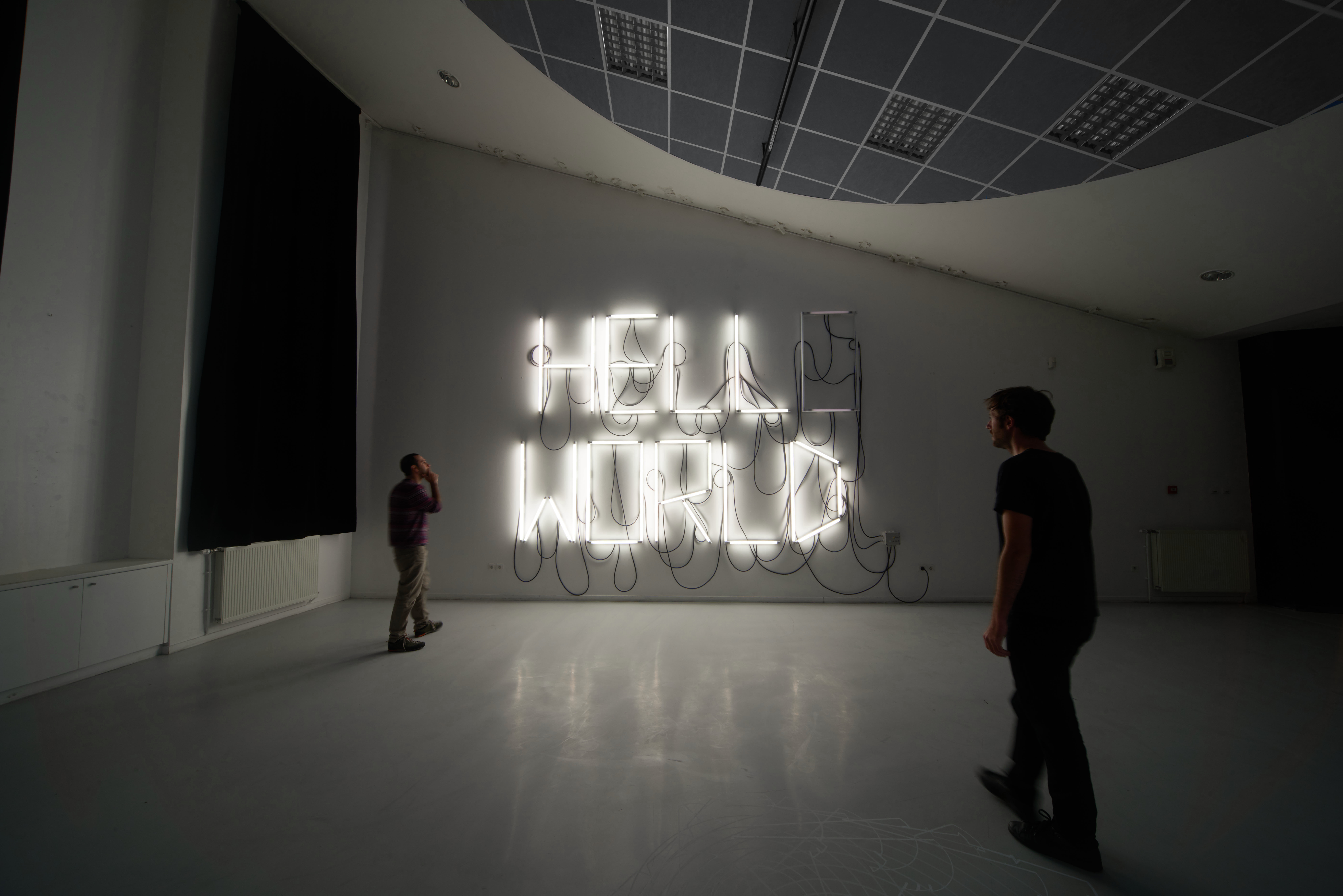 HELLO WORLD_Fabien Leaustic